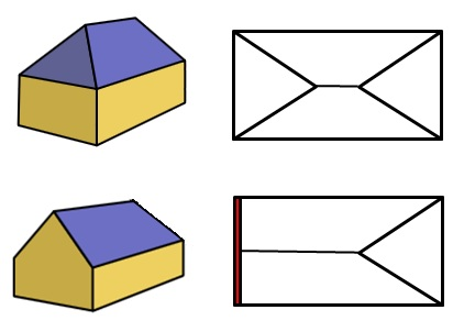 Řešení střechy při zamezení okapu vody na cizí pozemek